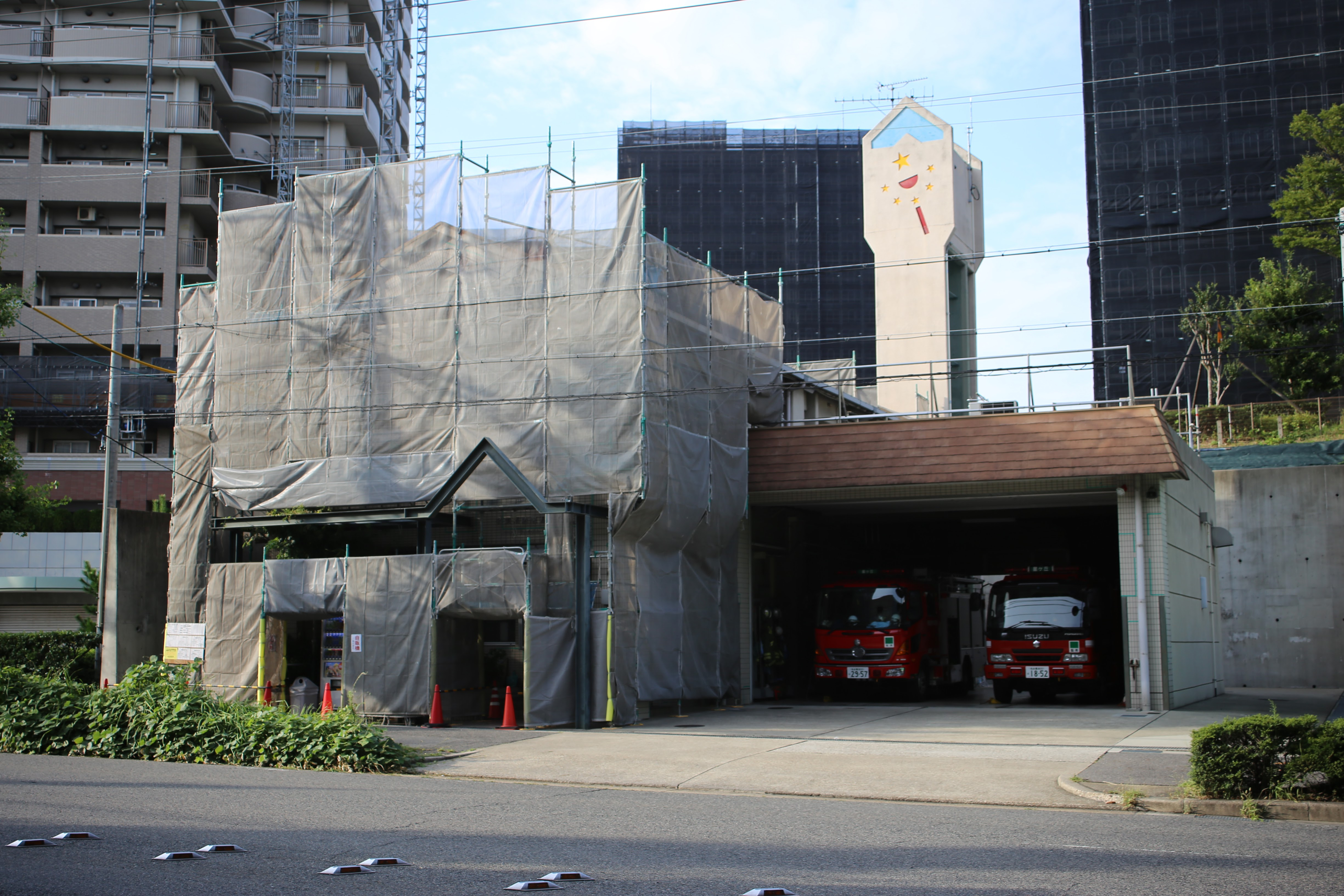 名古屋市名東区名東本町の名古屋市消防局名東消防署星ヶ丘出張所